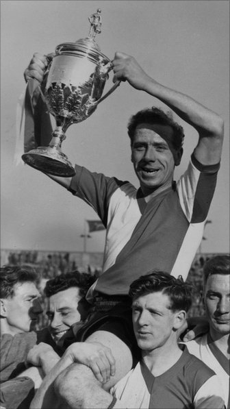 foto van de amateurs van Woking die de FA cup voor amateurs winnen